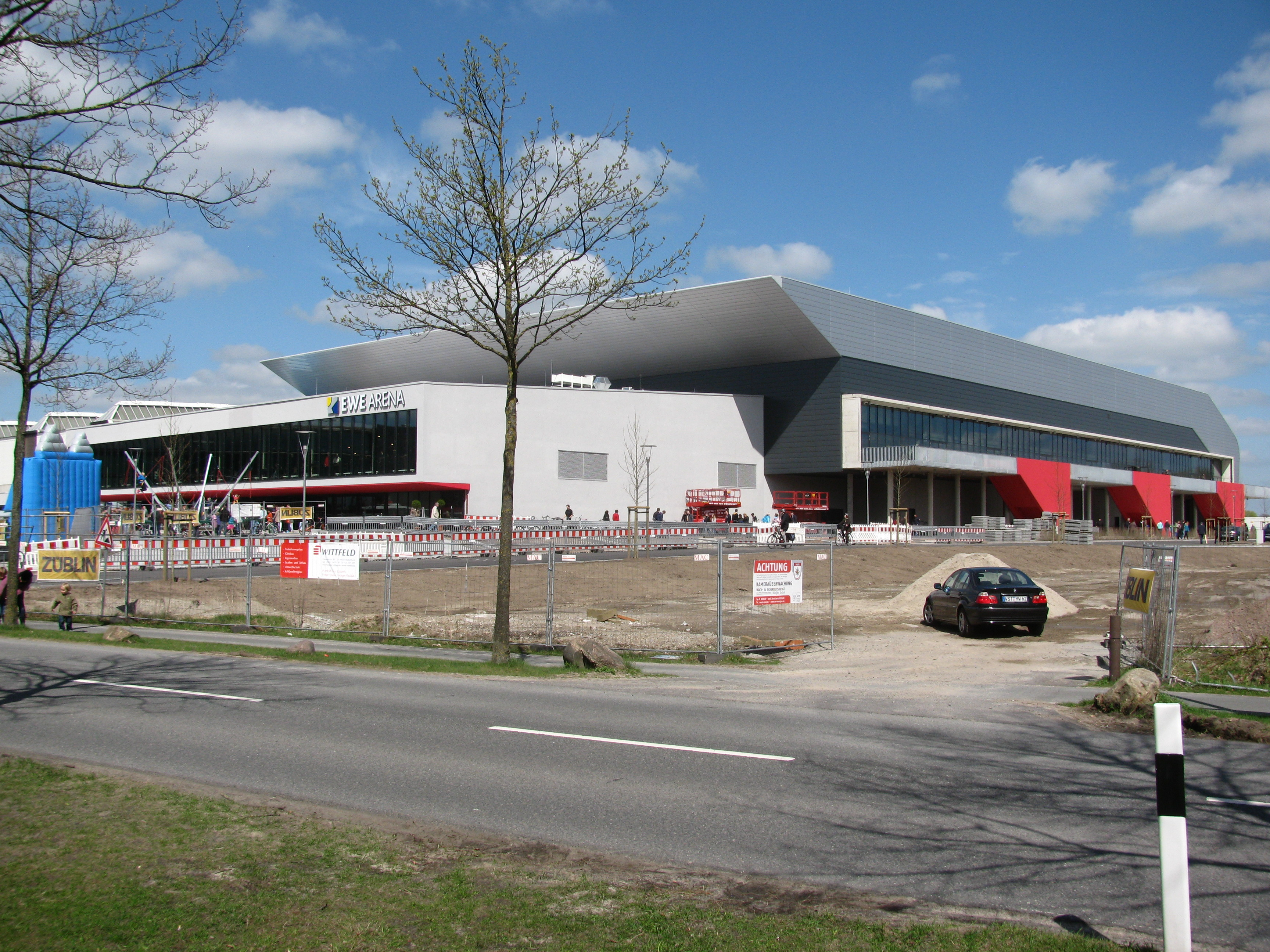 Oldenburg, Niedersachsen: Die "Grosse EWE Arena". Es ist die neuere von zwei EWE Arenen in Oldenburg: Das ältere, runde Stadion wird nun nach Fertigstellung dieses Neubaus als die "Kleine EWE Arena" bezeichnet.